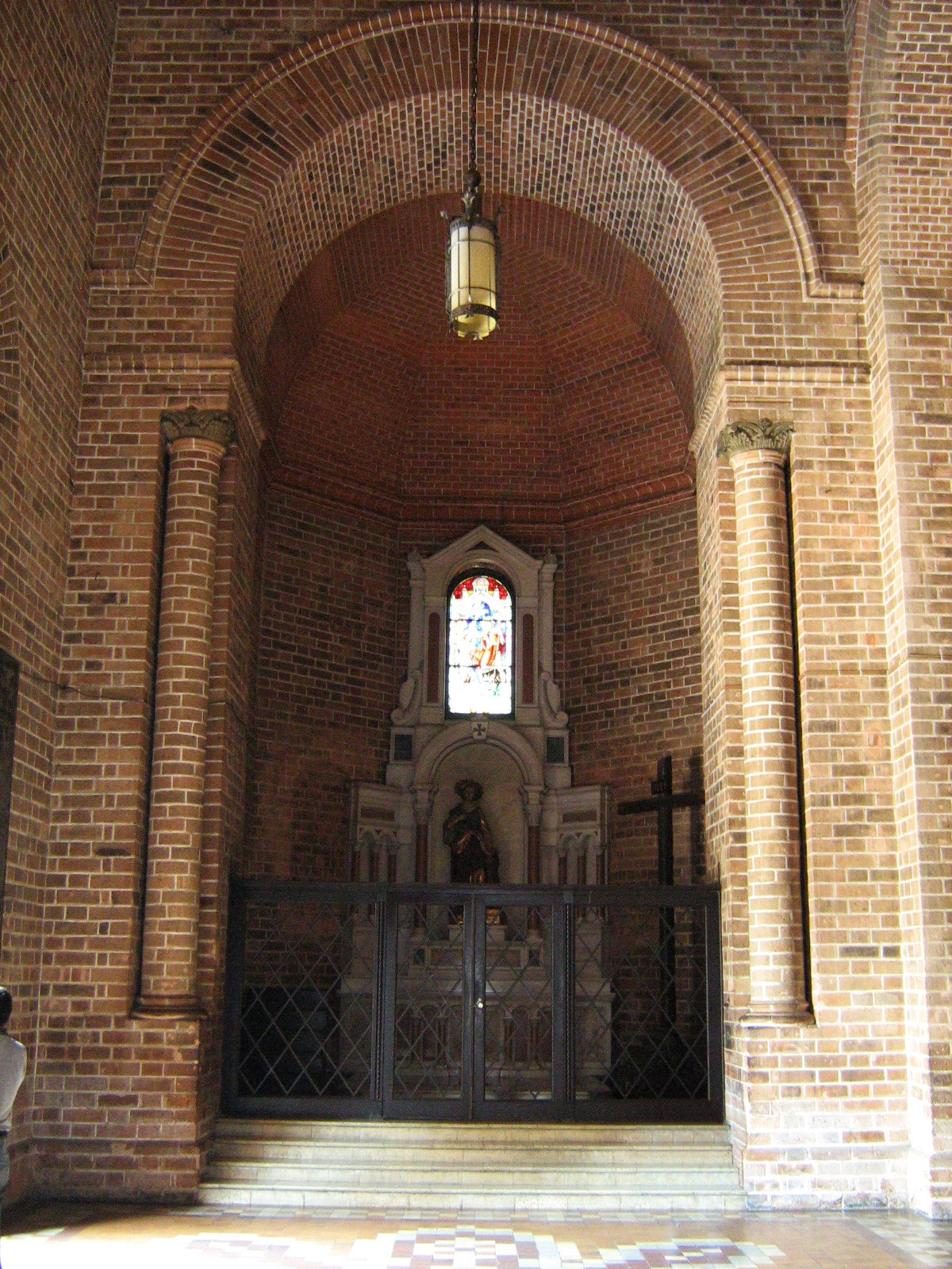 Ábside occidental de forma trapezoidal (trapecio isósceles) abovedado del Sotacoro o Pronave de la Catedral Metropolitana de Medellín. colombia